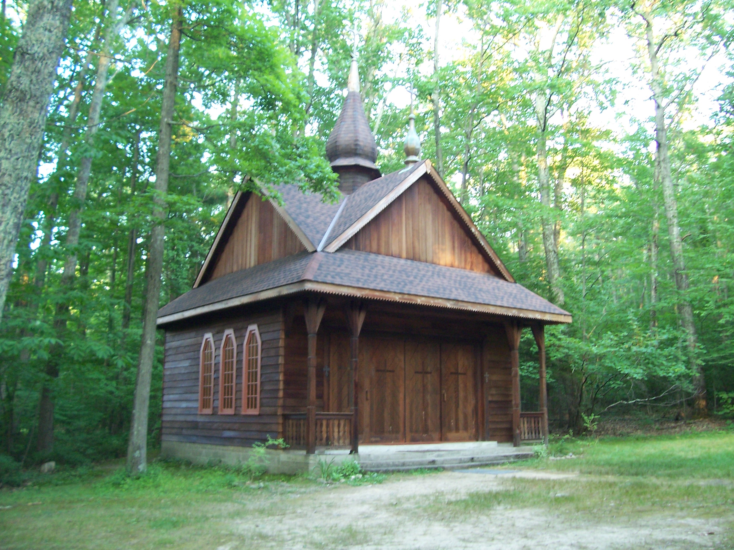 Soyuzivka